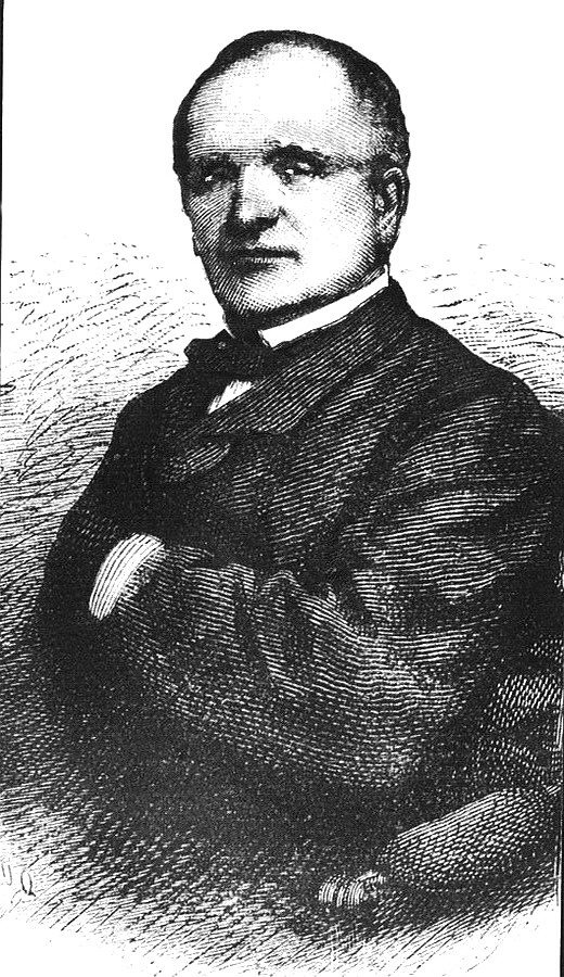 portrait d'Antoine Claude, dit Monsieur Claude